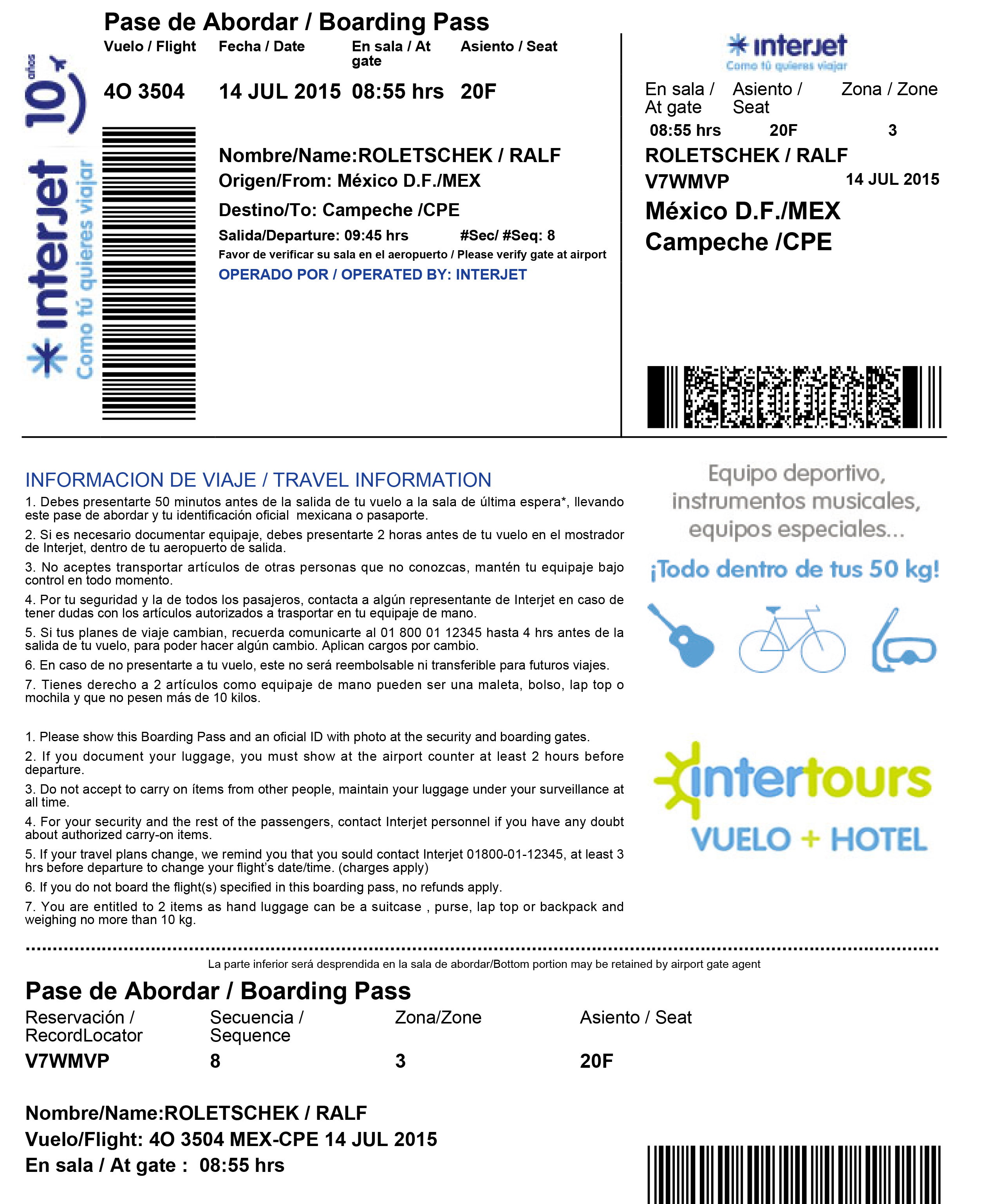 Bordkarte Interjet 2015 (MEX-CPE)